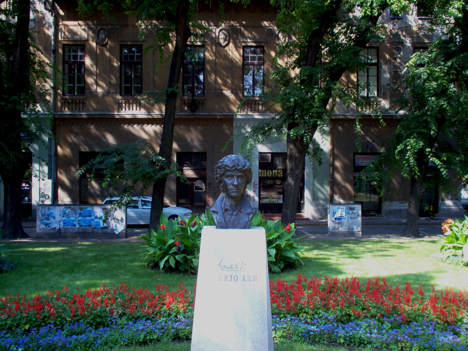 Споменик Данилу Кишу у Суботици. Фотографисао Голдфингер